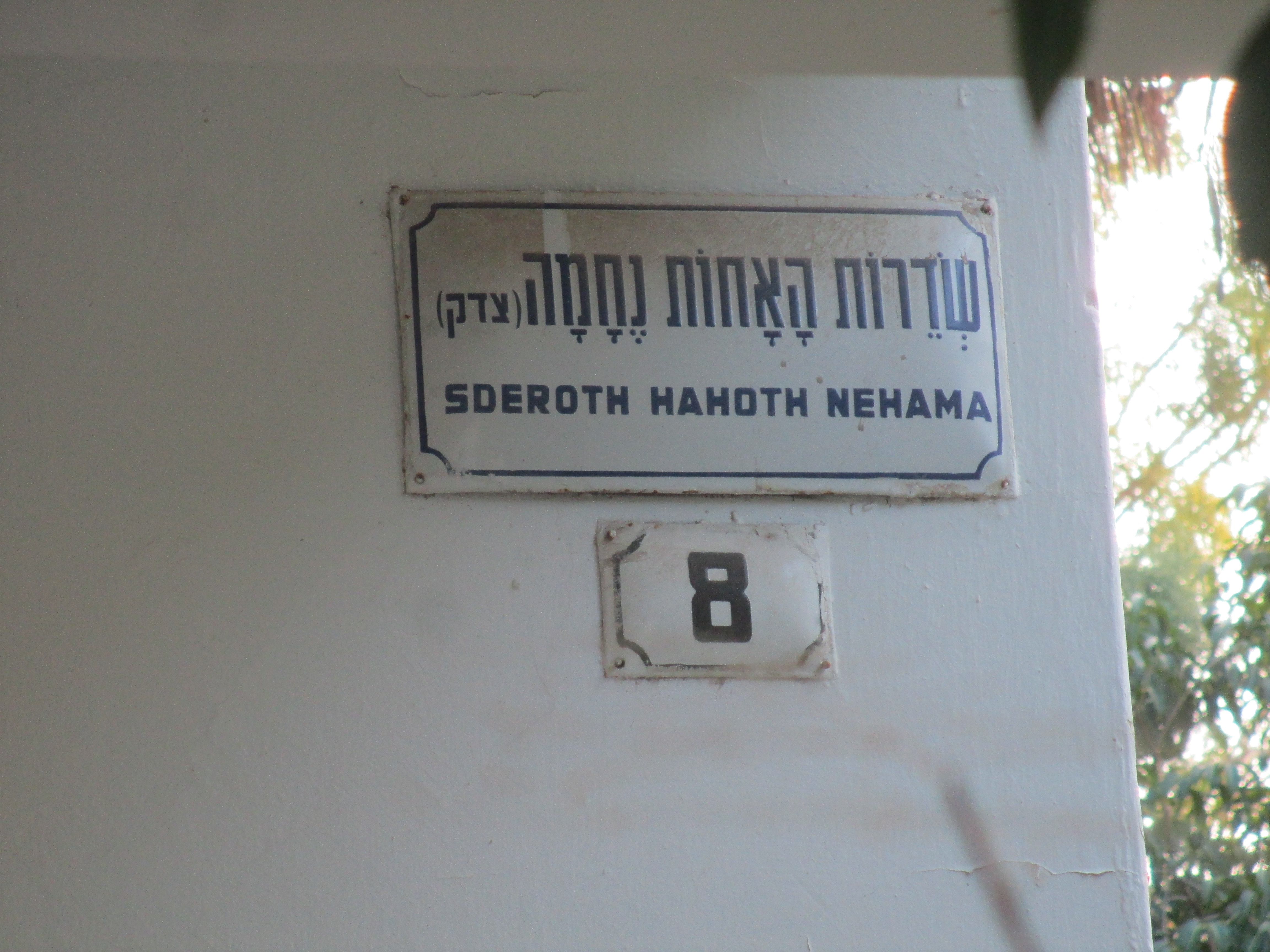 שלט רחוב בשדרות האחות נחמה צדק ברמת גן